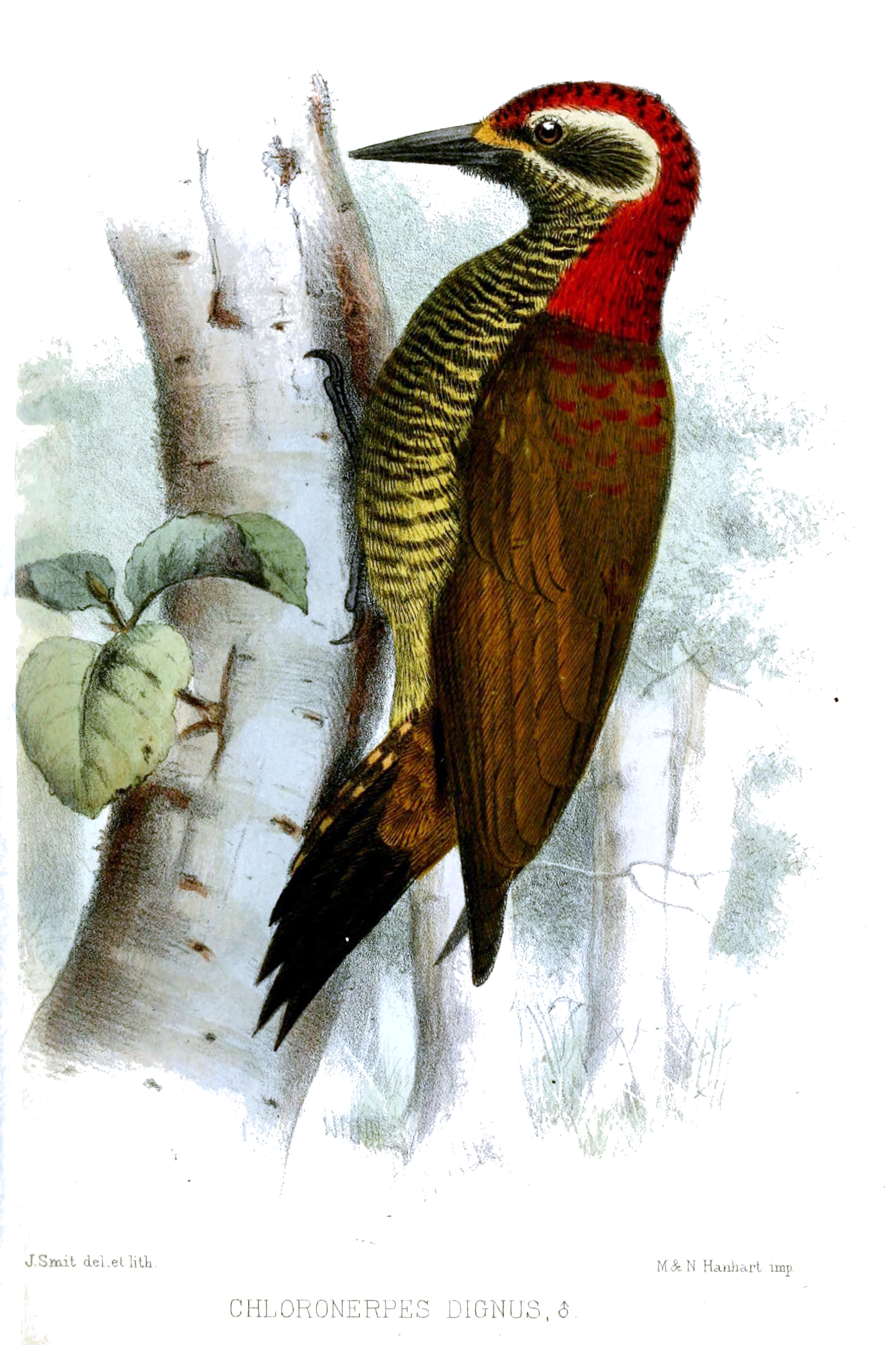 Chloronerpes dignus (male)= Veniliornis dignus